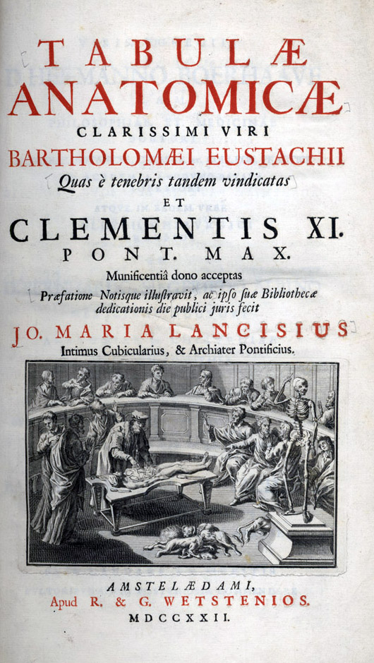 Bartolomeo Eustachi (1520?-1574): Tabulae anatomicae clarissimi viri, 1722.